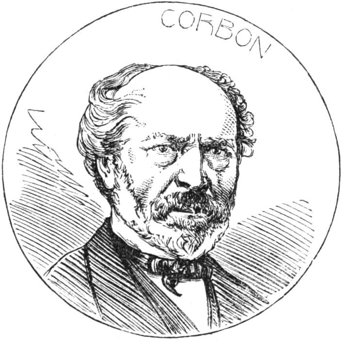 "Les soixante-quinze sénateurs inamovibles ... Dessins de M. Bocourt" : "Corbon".